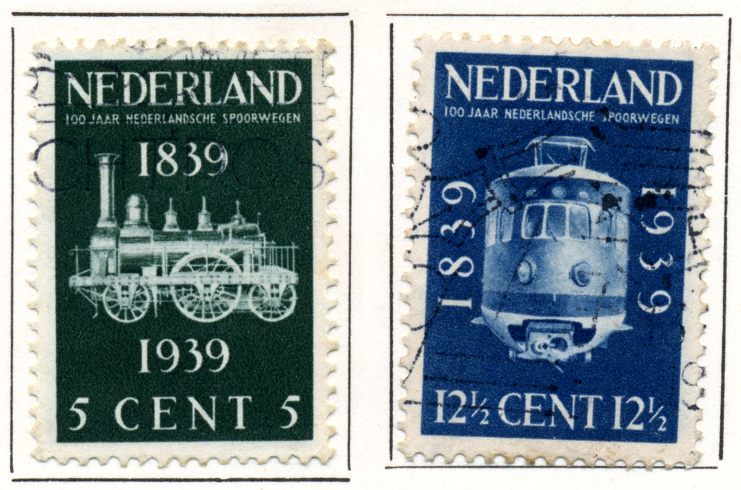 Jubileumzegels Nederlandse Spoorwegen (1939) Oude locomotief uit 1839 en elektrisch treinstel als in 1939. NVPH nr 325-326. Ontwerp van G.V.A. Röling